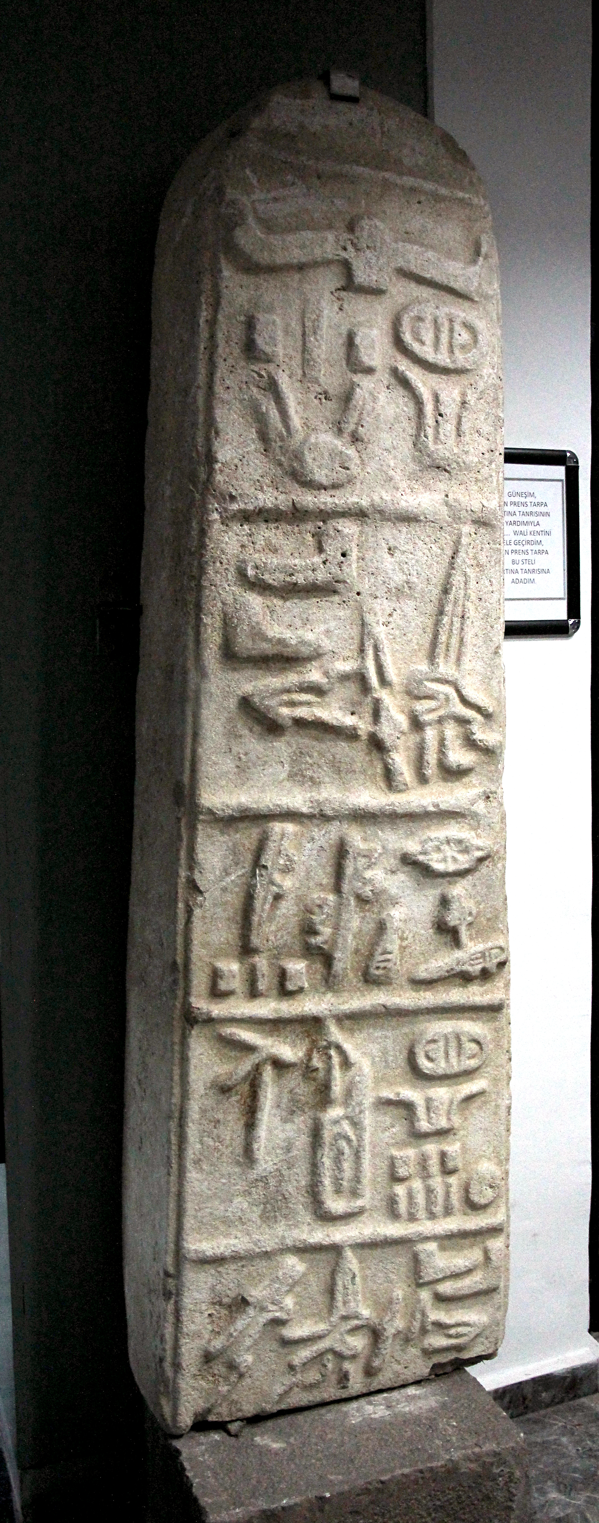 Archäologisches Museum, Afyonkarahisar, Zentraltürkei, hethitische Stele von Kocaoğuz